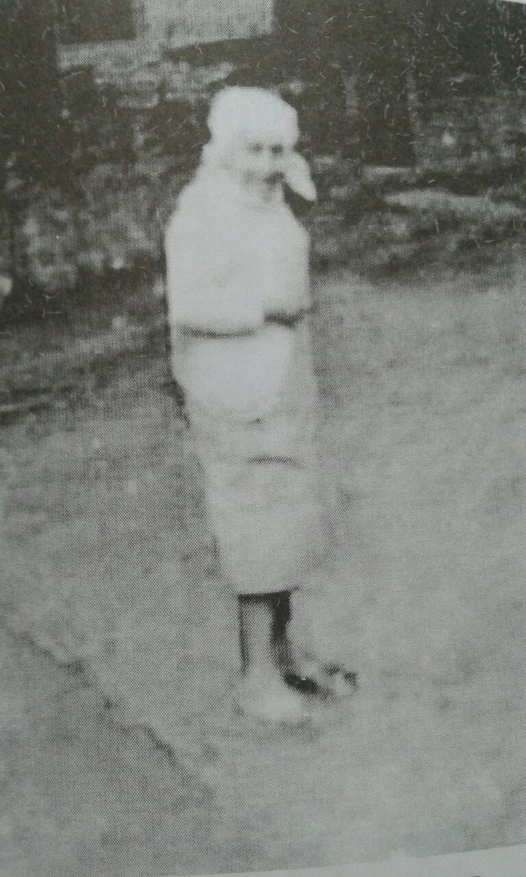 Caroline, mais conhecida como Calina, inicialmente chamada de Luca Moa